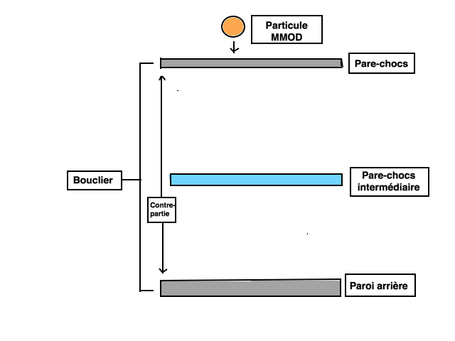 Structure de protection aérospatiale contre les micrométéroïdes.